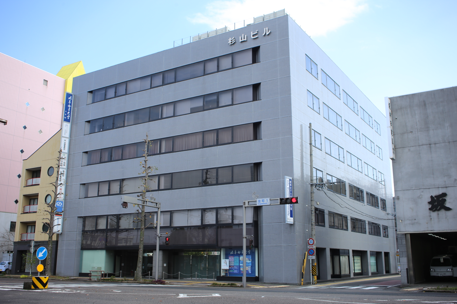 岐阜市明徳町の杉山ビル